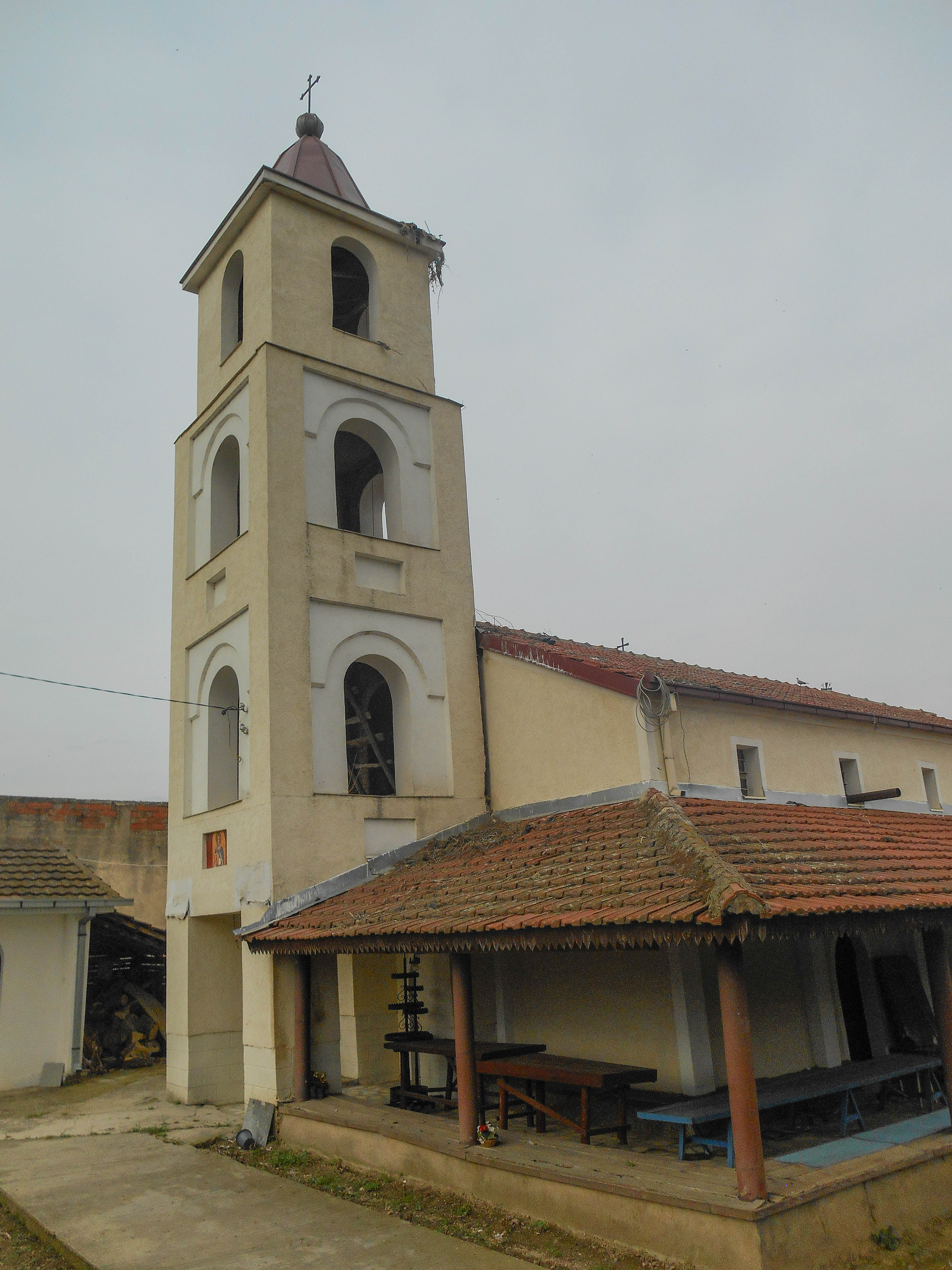 Црквата Свети Илија во Сачево